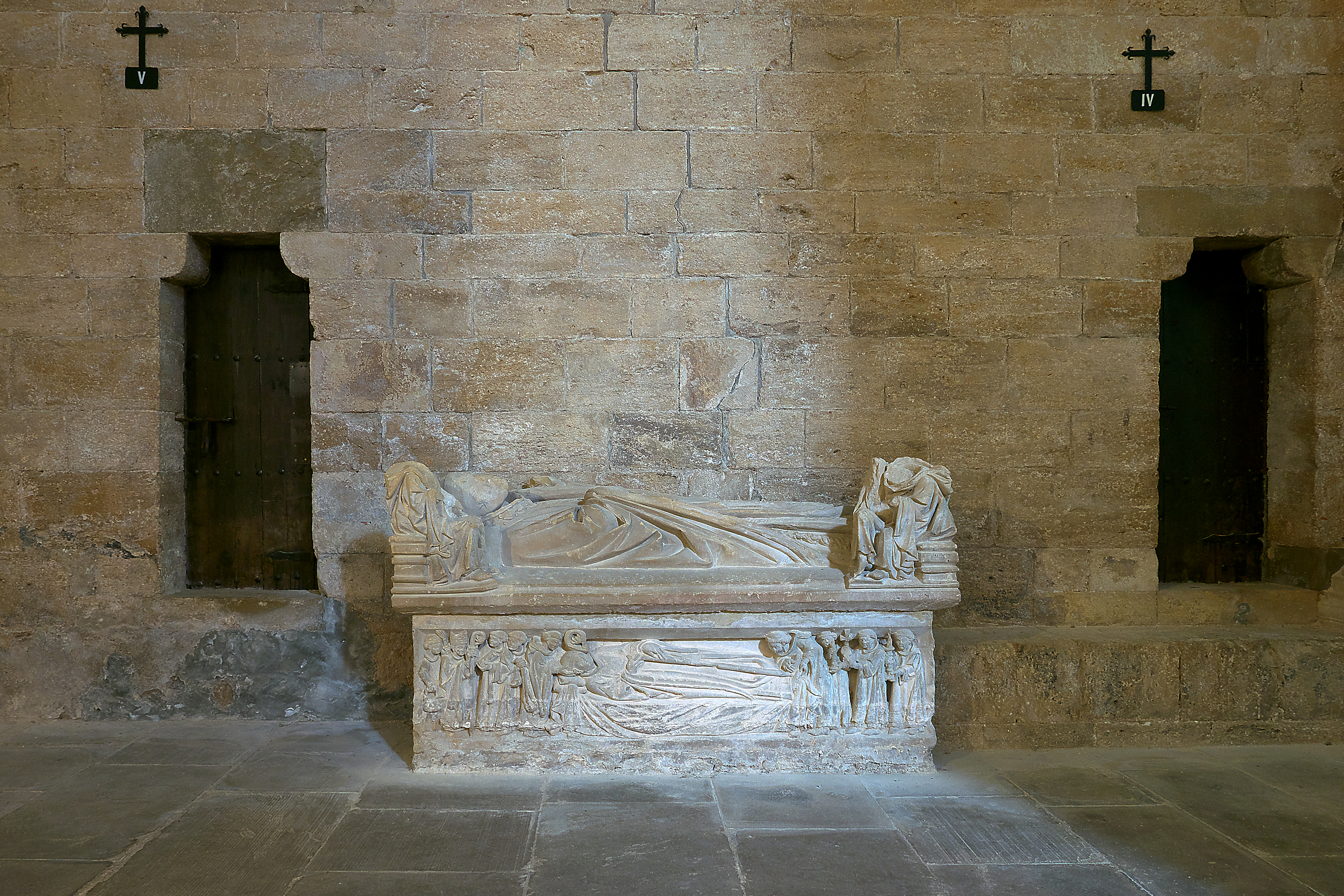 Monasterio de Santa María la Real de Irache. Nave del Evangelio. Sepulcro de san Veremundo de Irache, primer abad benedictino (1052-1092) del Monasterio de Irache.